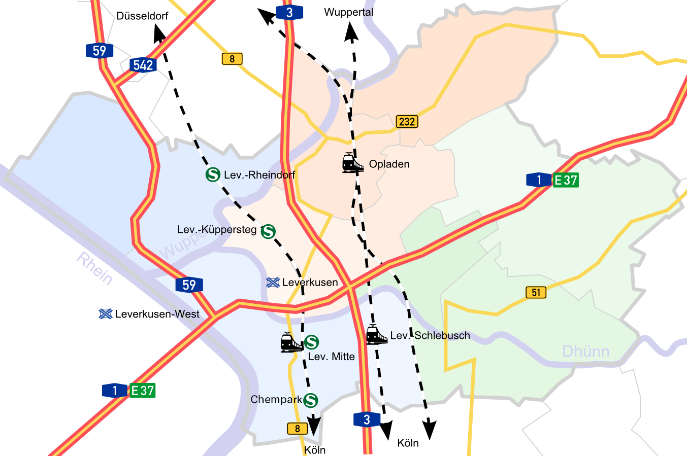 Verkehrsverbindungen in Leverkusen